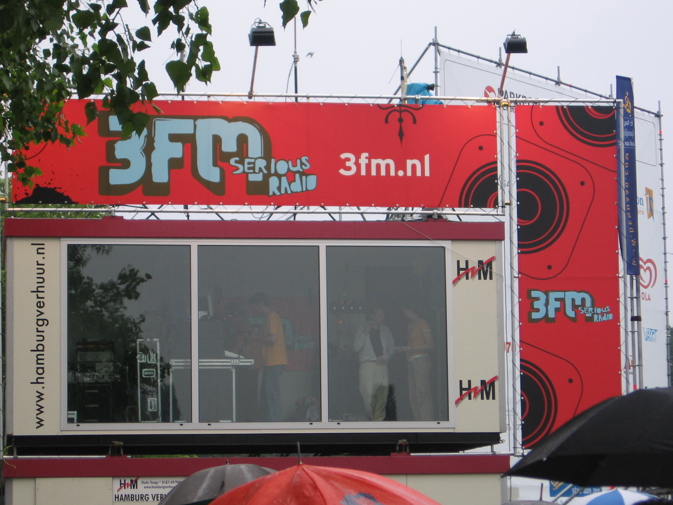 3FM cabine, Zuiderpark tijdens Parkpop 2006